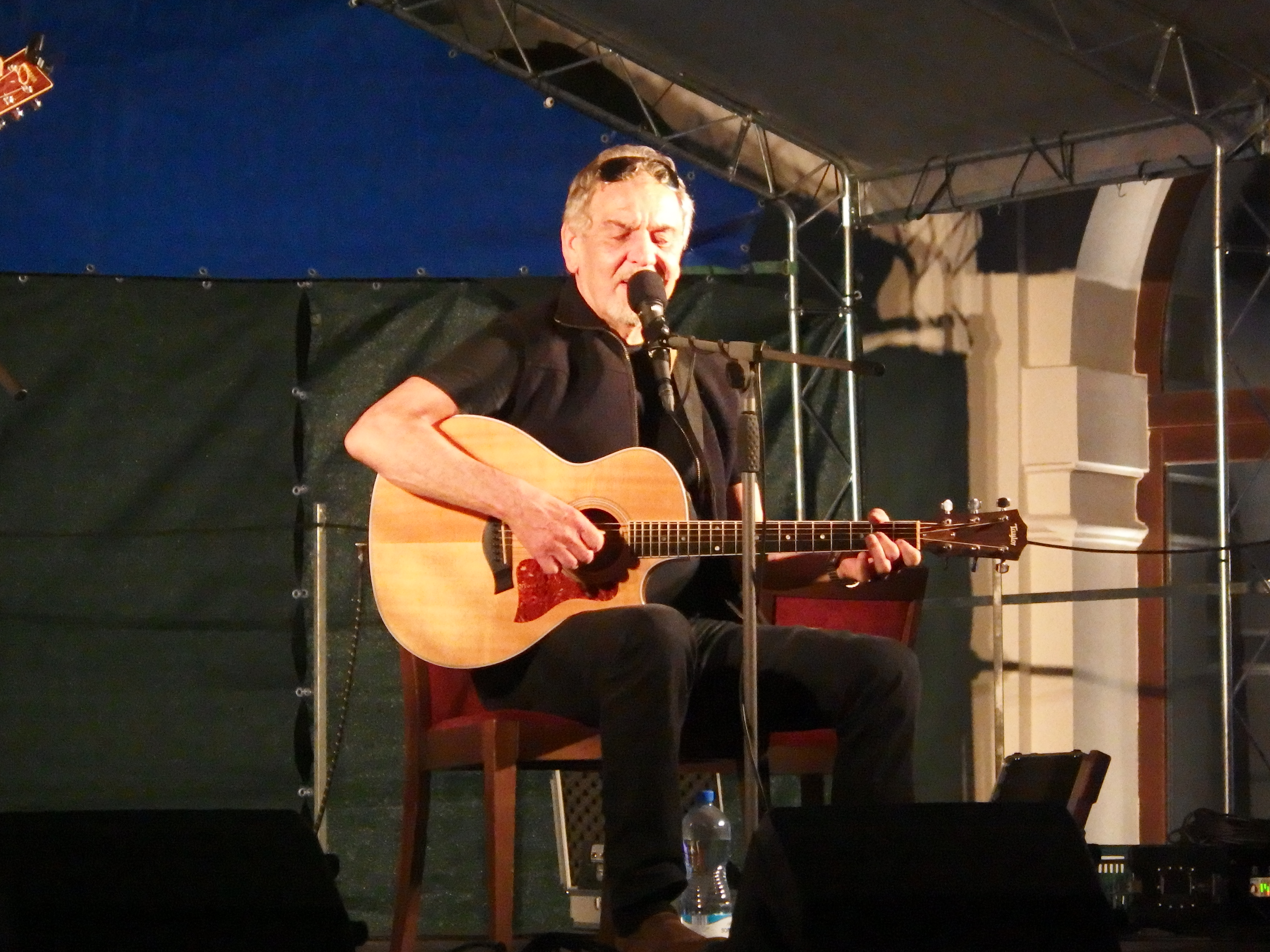 Wabi Daněk na festivalu Toulavej, Holešov 16.8. 2014